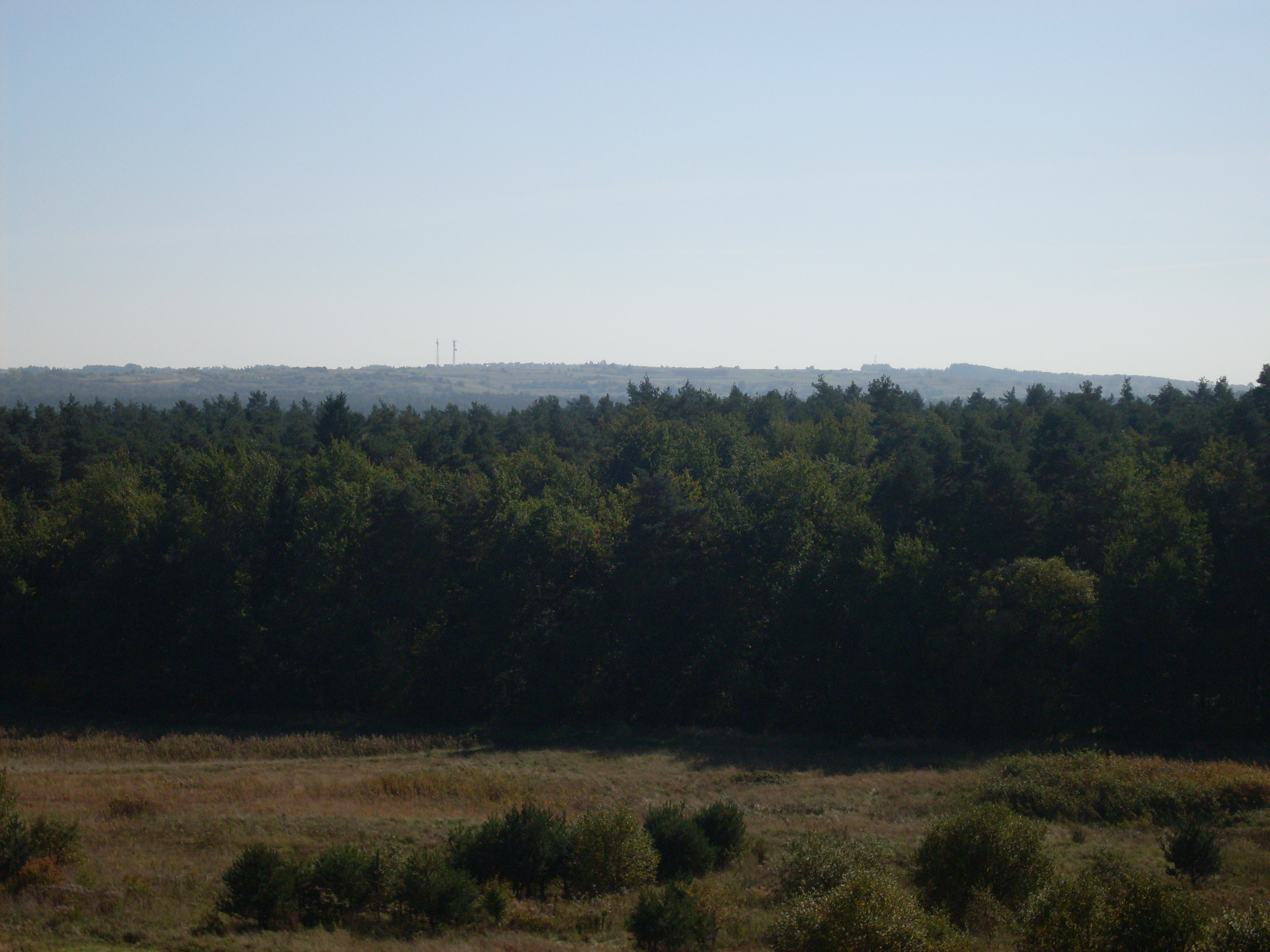 Widok z wzgórza Skałki w Tenczynku na Ligunową Góre w Zalasie